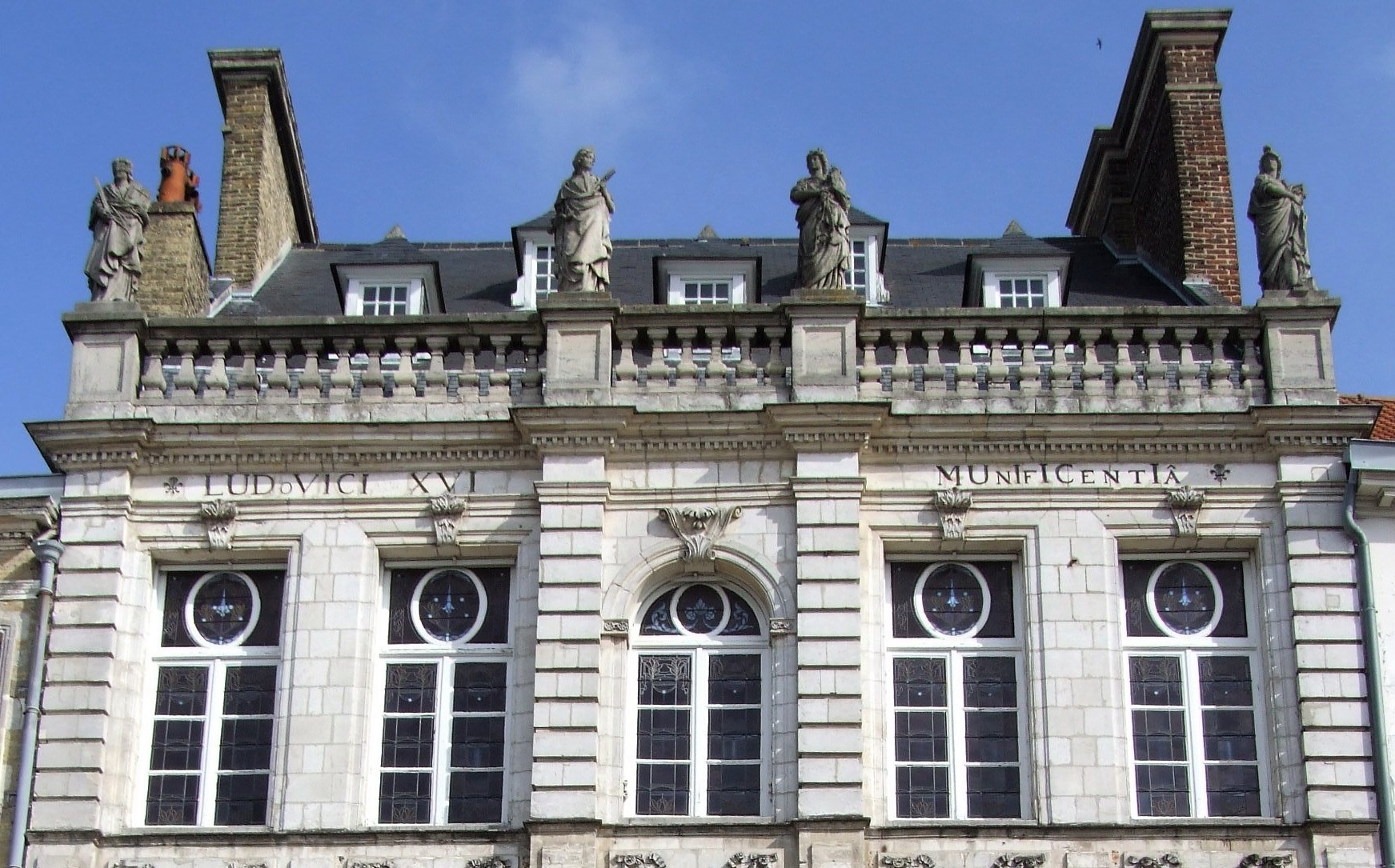 Saint-Omer - Hôtel du baillage - Façade